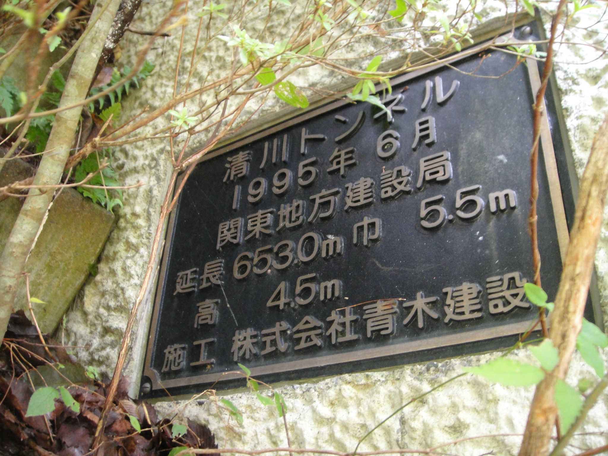 清川村道土山高畑線 清川トンネル